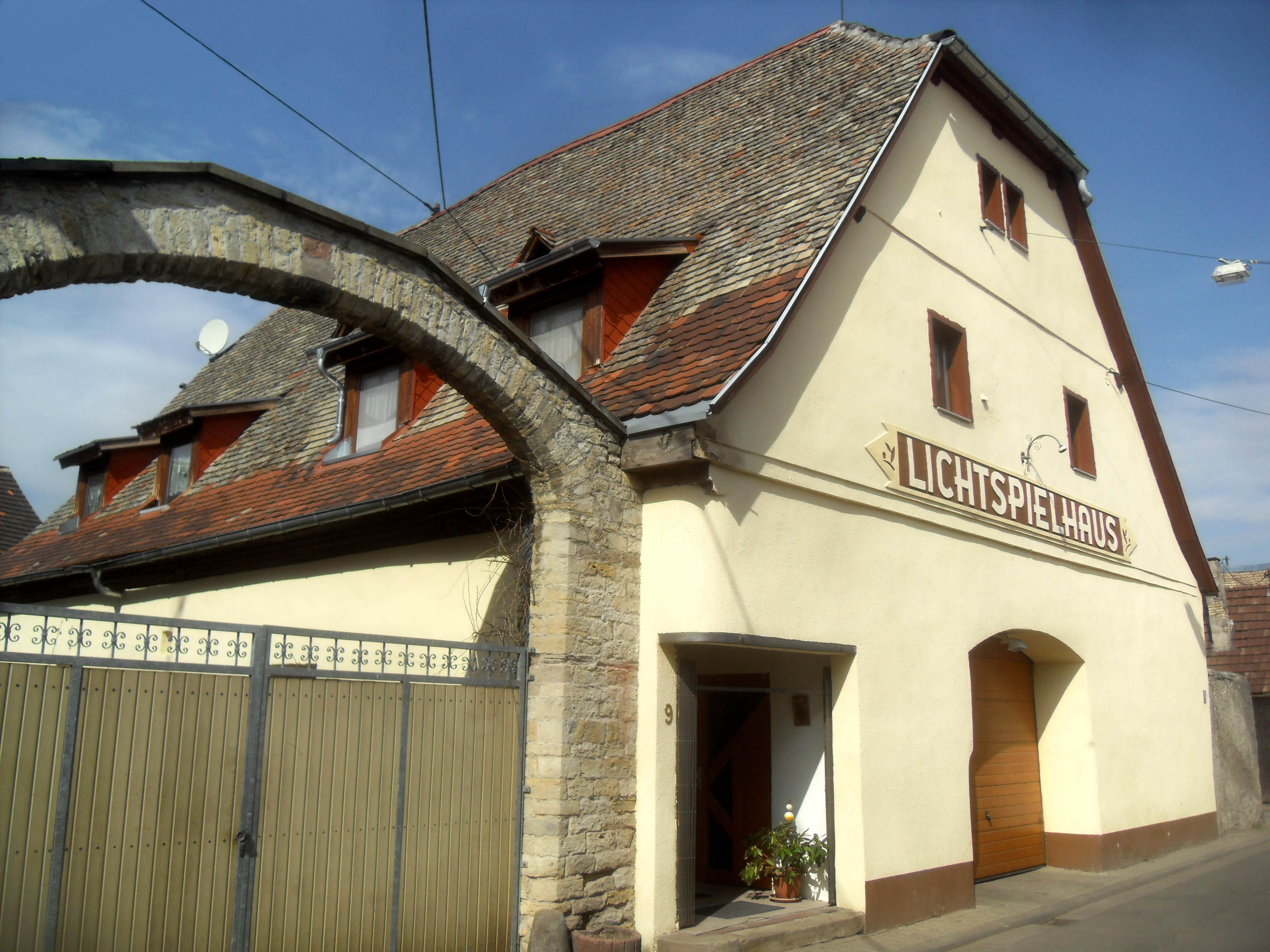 Der Polysche Hof (Kino) in Guntersblum in Rheinhessen (Deutschland) von der Ölmühlstraße aus